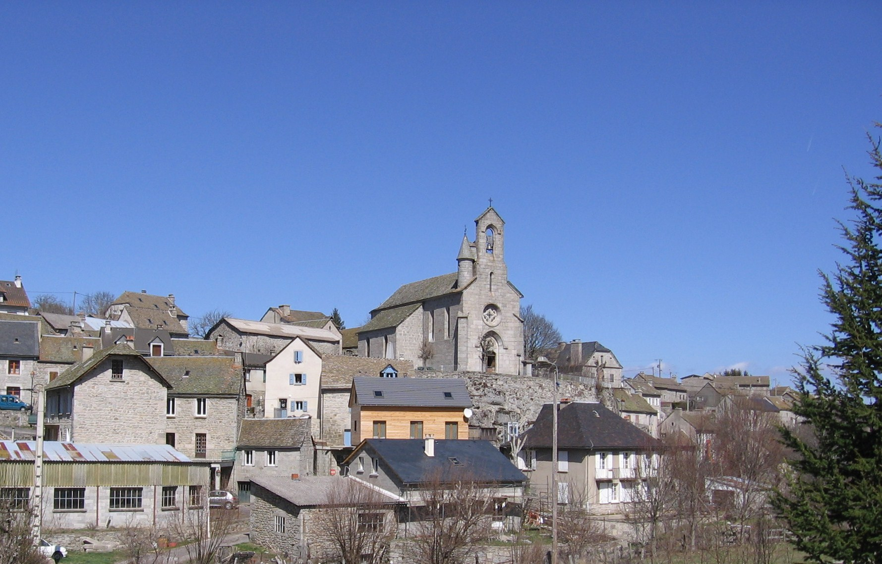 Photo de l'Eglise du Buisson, printemps 2008.